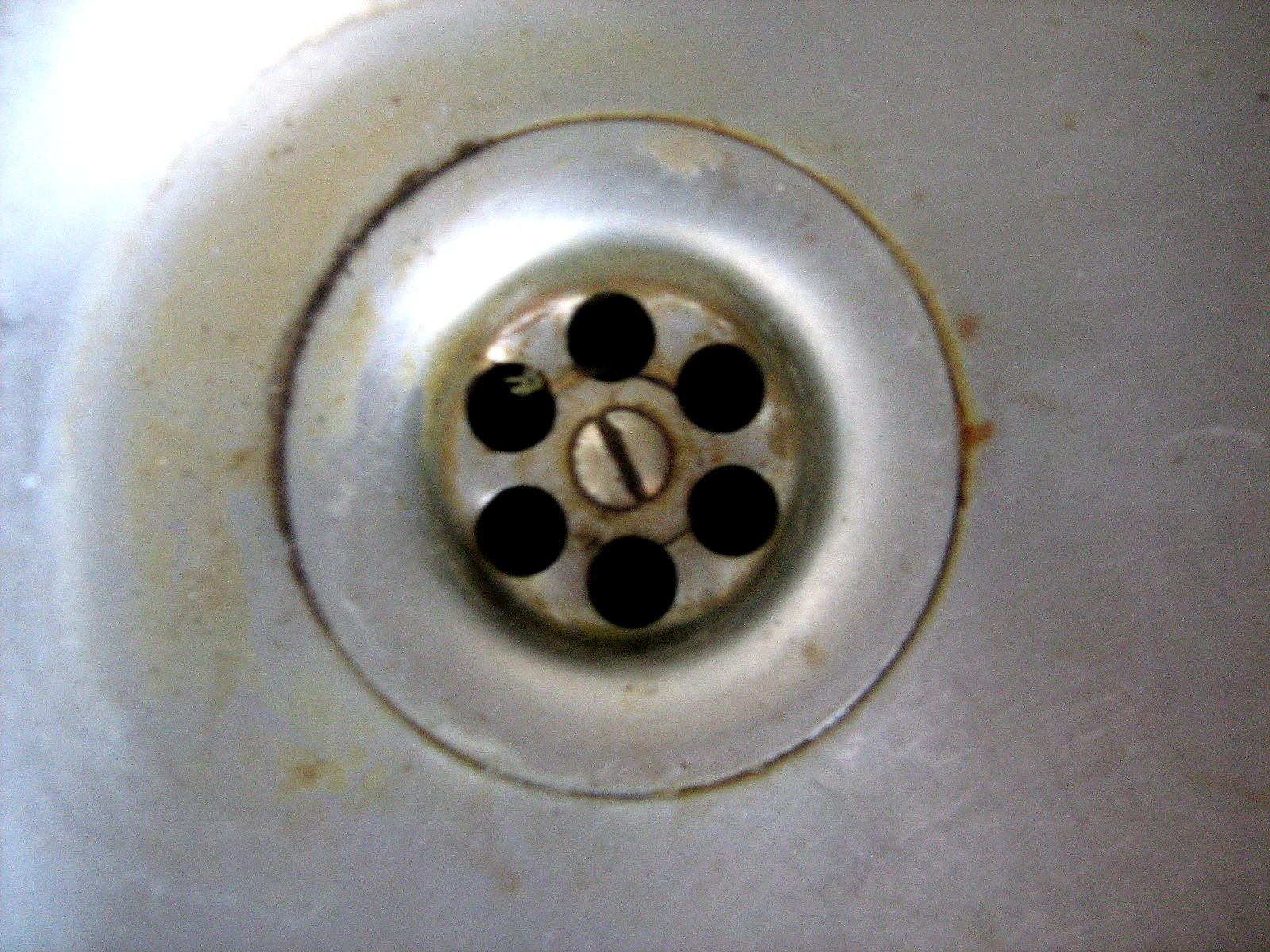 Ausguss von einer Küchenspüle